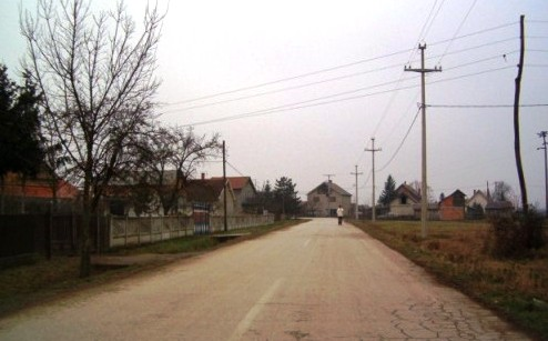 Врховине.